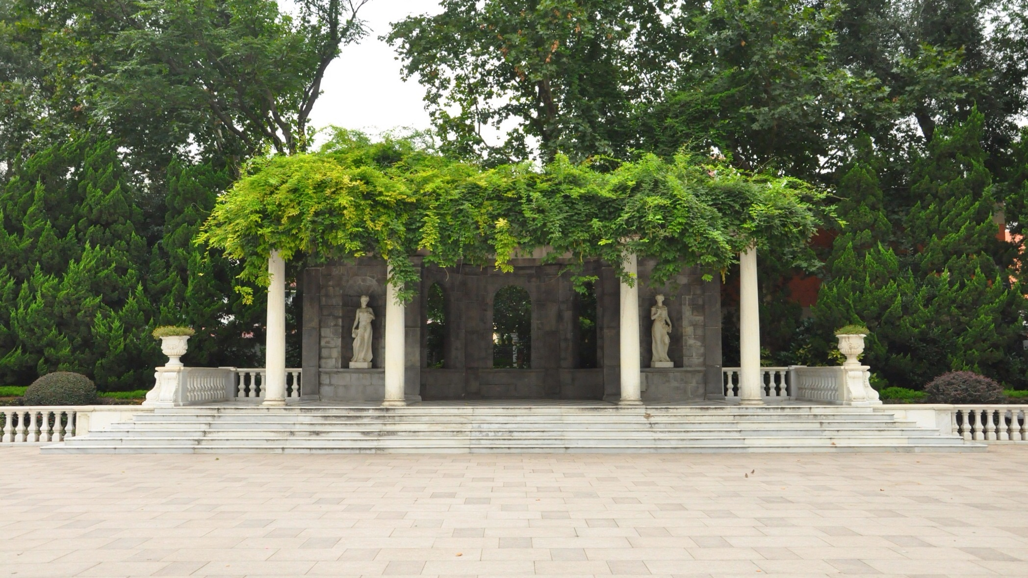 大理石亭 长宁路780号中山公园内